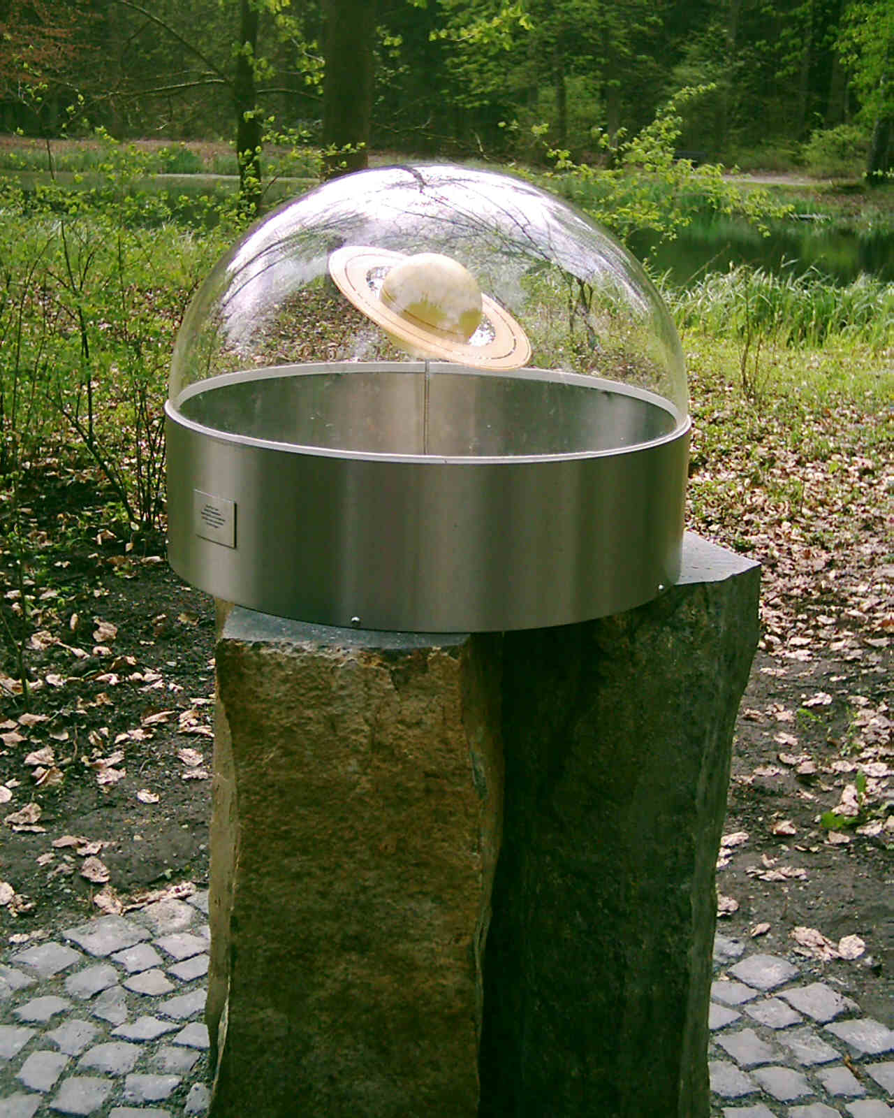 Planetenweg in Bad Lippspringe (Planetariumgesellschaft OWL), Foto vom Saturn